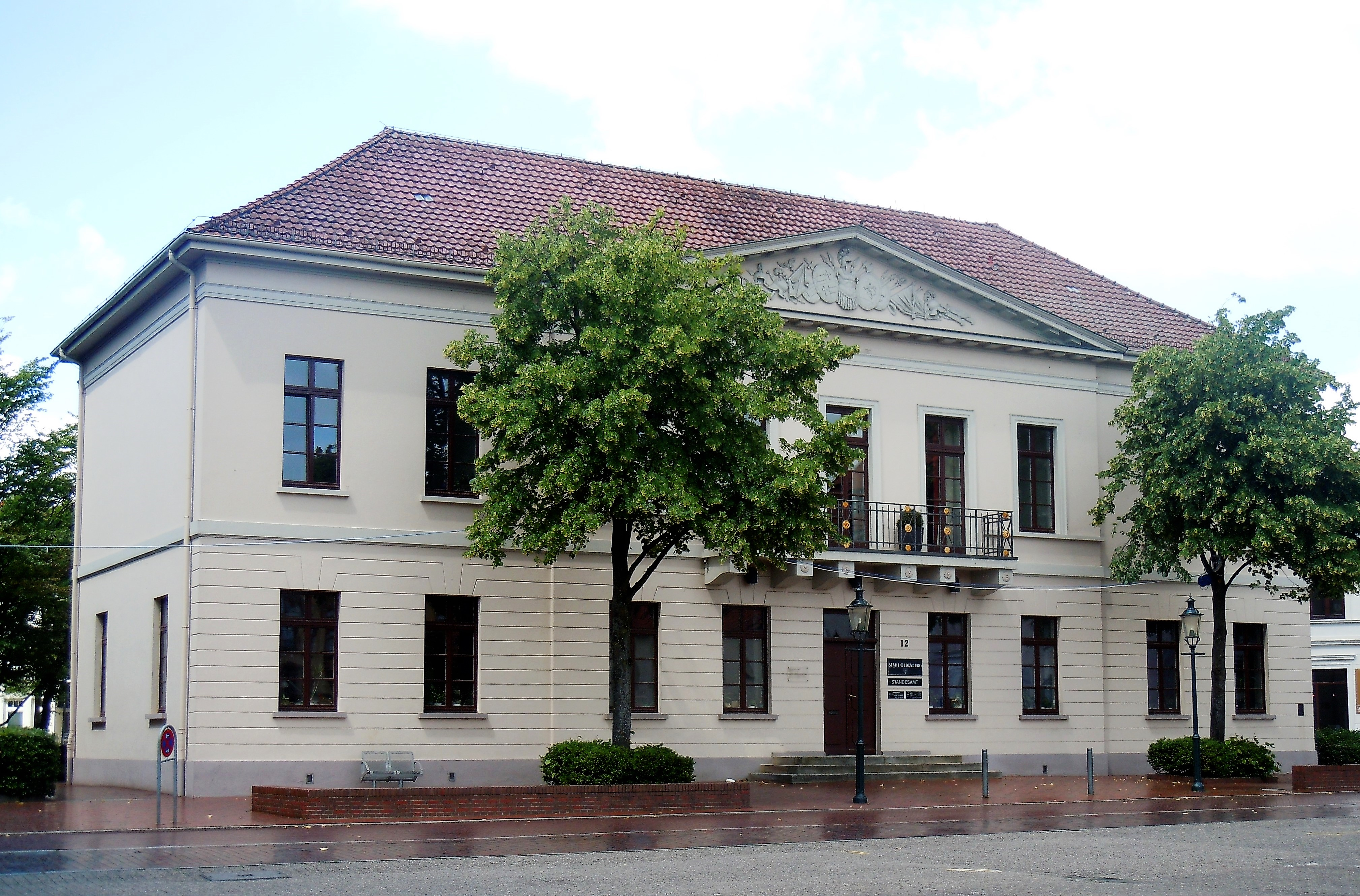 Gebäude aus dem 19. Jahrhundert am Pferdemarkt (Hausnr. 12) in Oldenburg (Oldenburg)